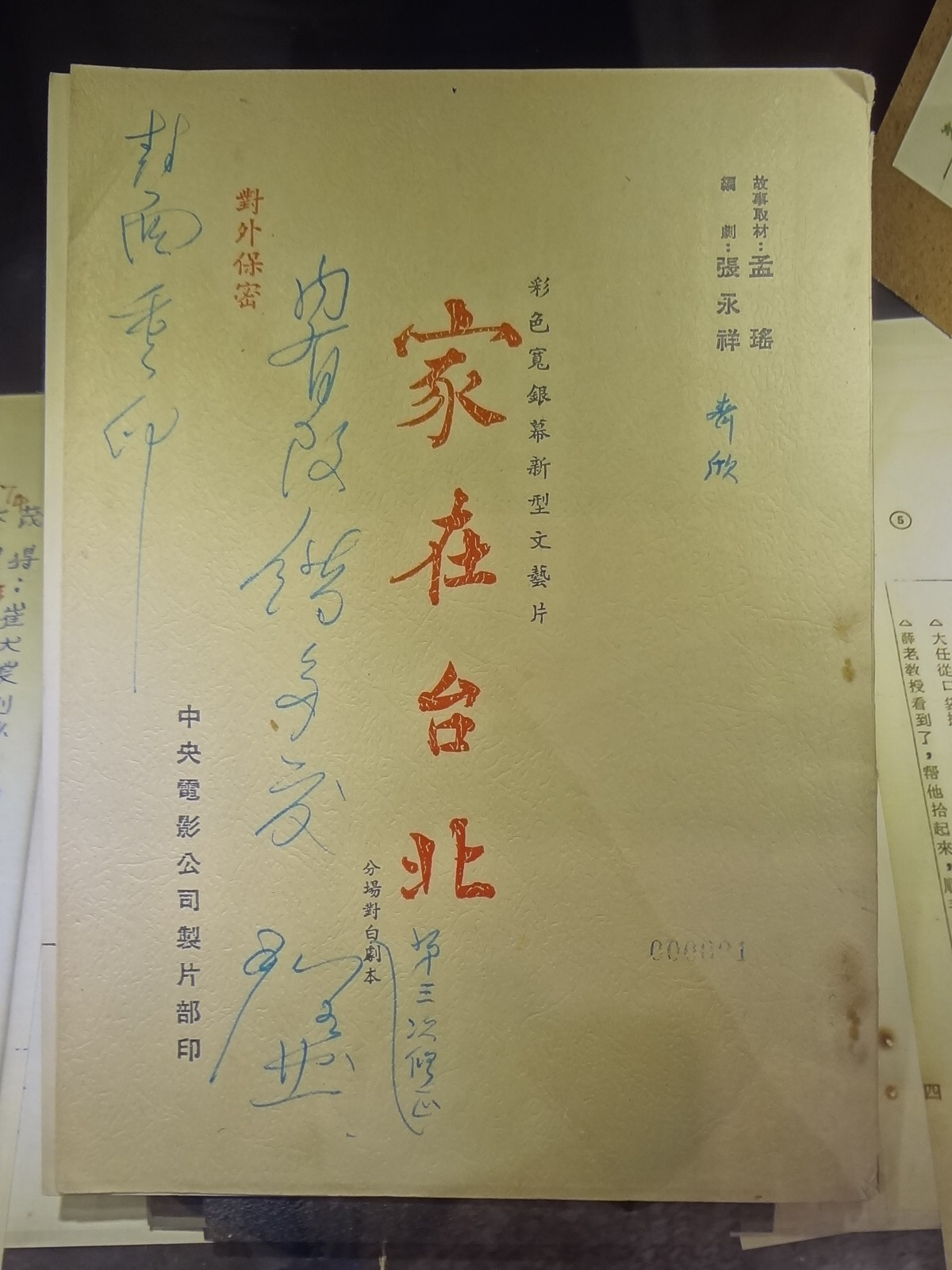 金馬50風華展展示的中央電影公司電影《家在台北》分場對白劇本。